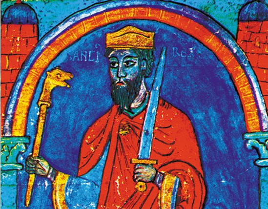 Sancho I. Leónský